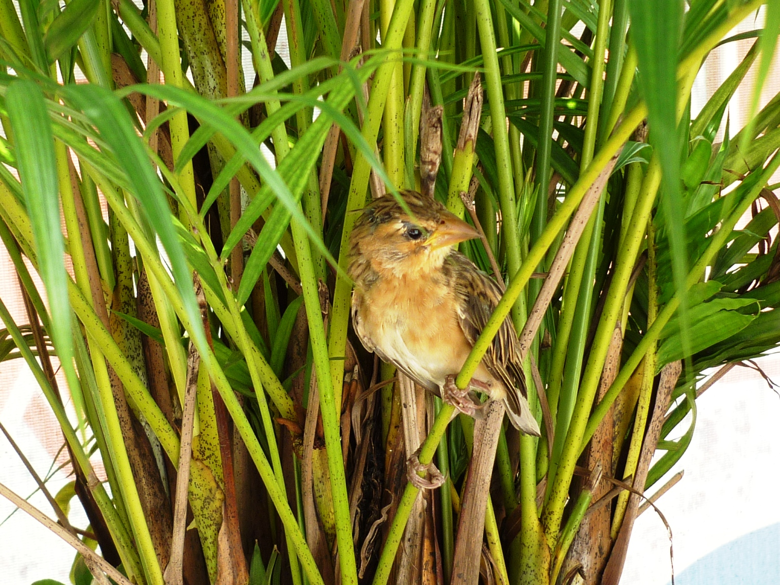 Một con chim sẻ ẩn mình trong bụi dừa